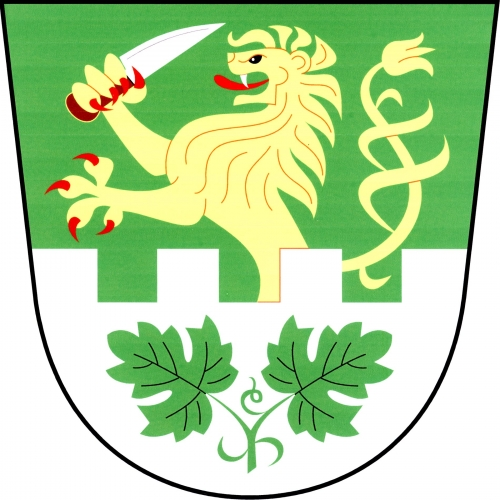 znak,Kyjovice , okres Znojmo